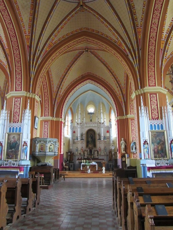 Асава. Касцёл